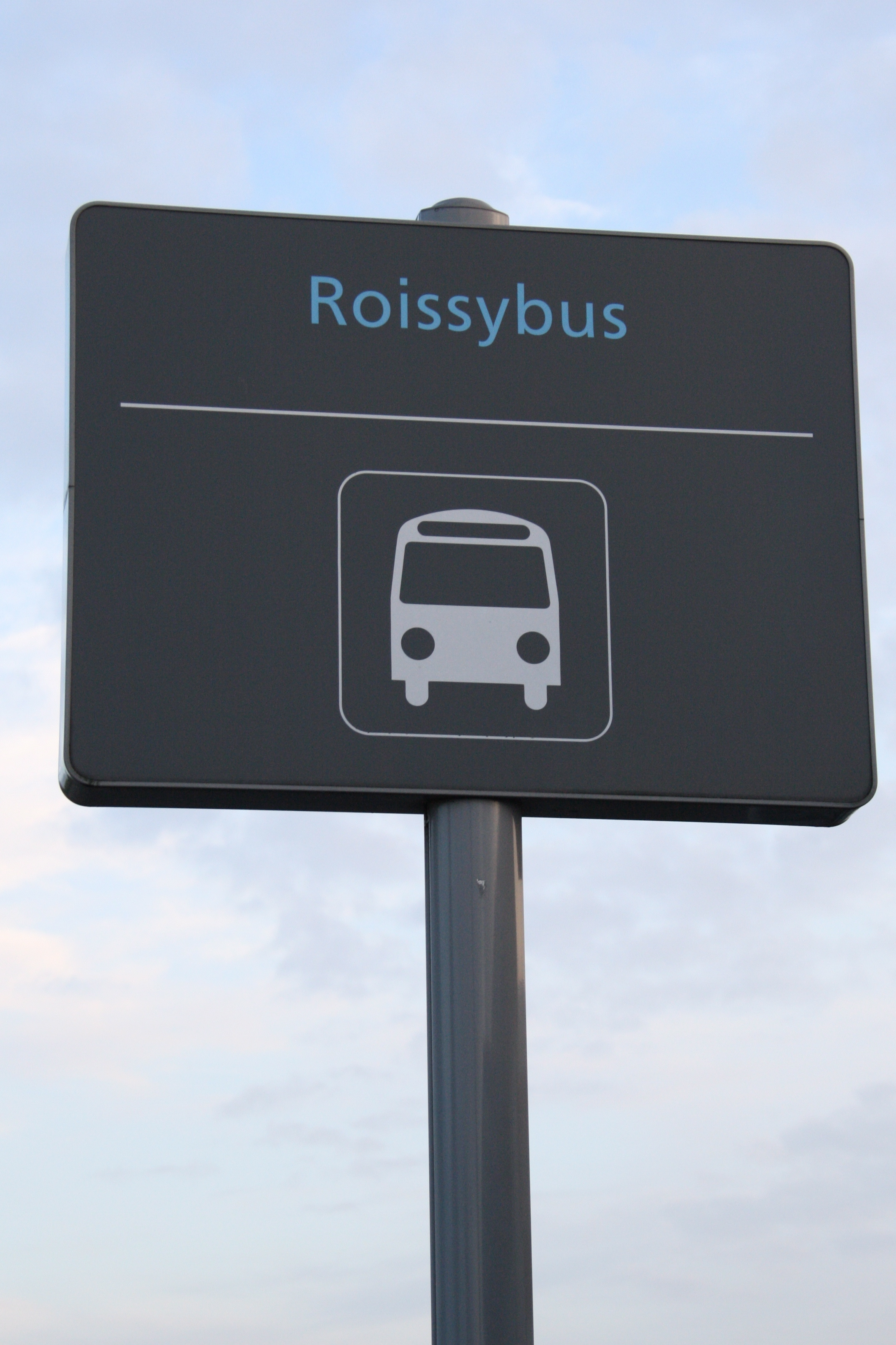 Bus stop at Charles de Gaulle Airport T3, France.